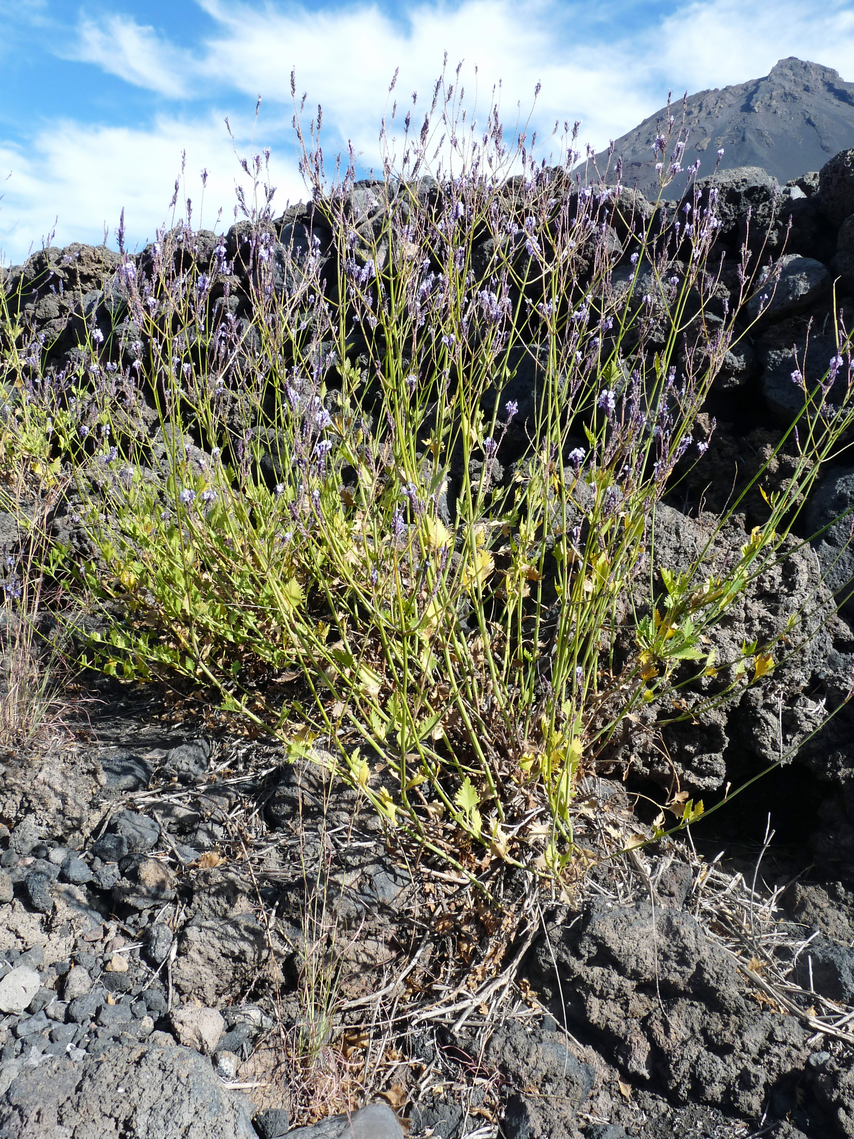 Chã das Caldeiras (île de Fogo, Cap-Vert) : Lavandula rotundifolia, espèce endémique